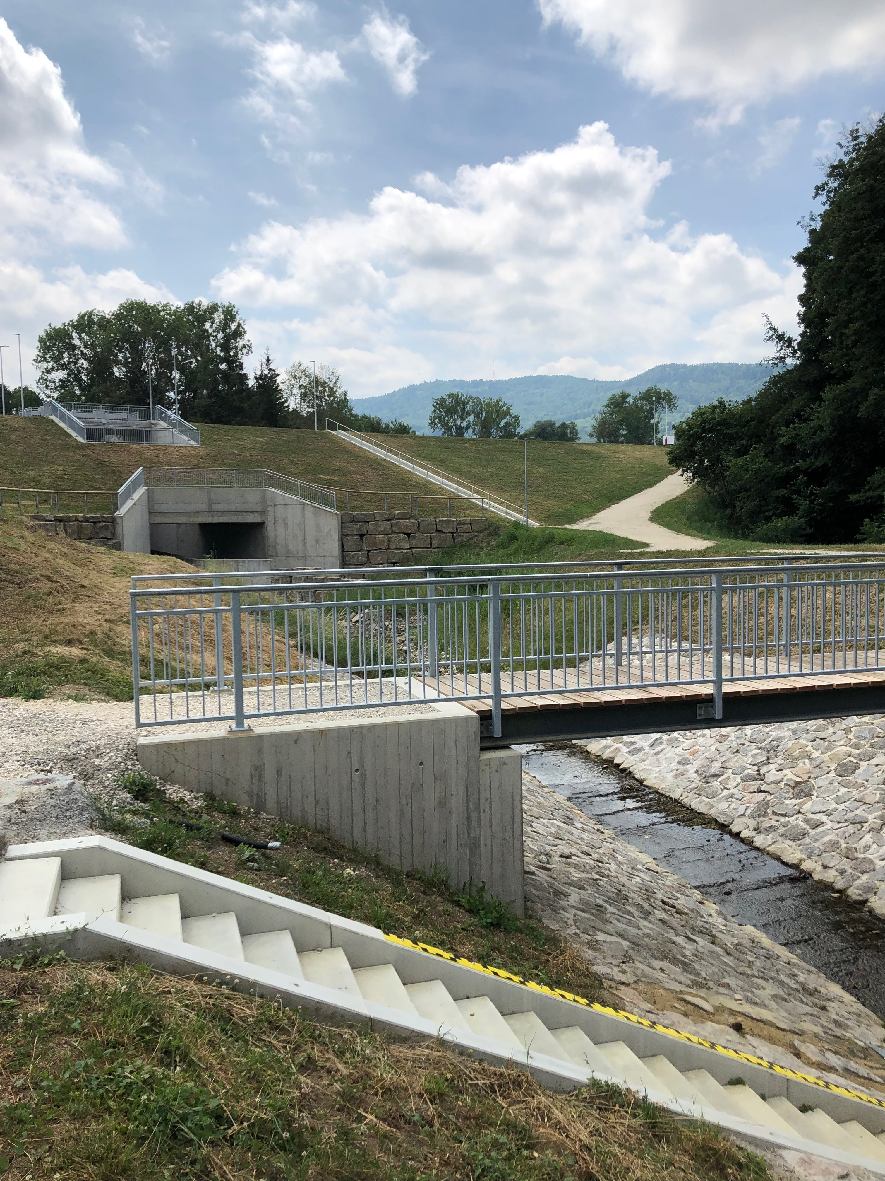 Hochwasserrückhaltebecken Reichenbach am Reichenbach zwischen Boll und Stetten, beides Stadtteile von Hechingen im Zollernalbkreis.